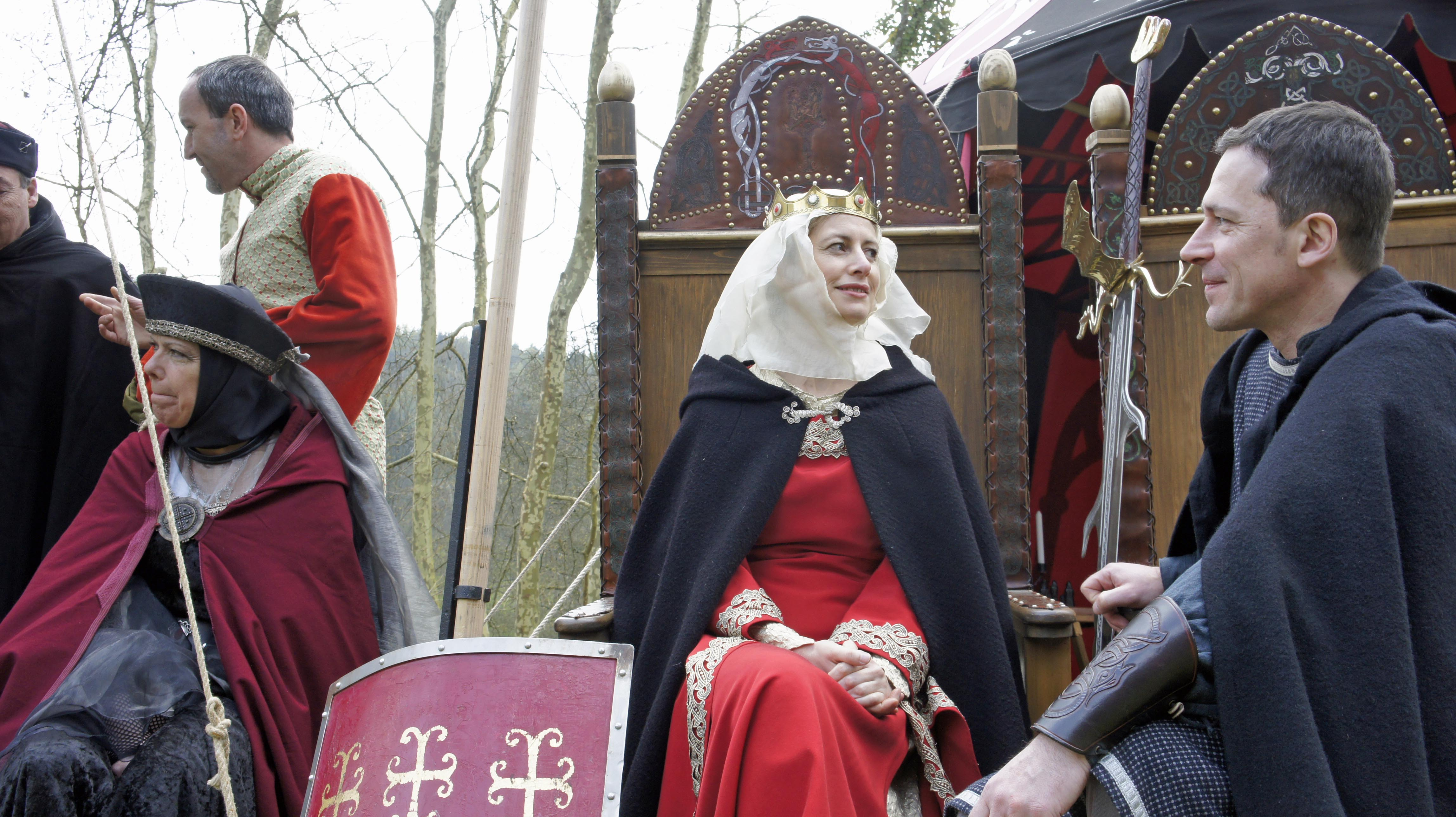 Vie de Cour au Printemps des Légendes 2012.